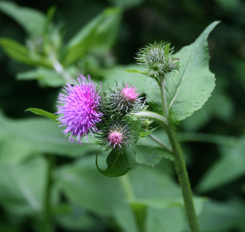 Kletten-Ringdistel (Carduus personata), Korbblütler (Asteraceae) - Österreich/Austria/Autriche: Oberösterreich, Hausruckviertel, Kien NW Attnang-Puchheim